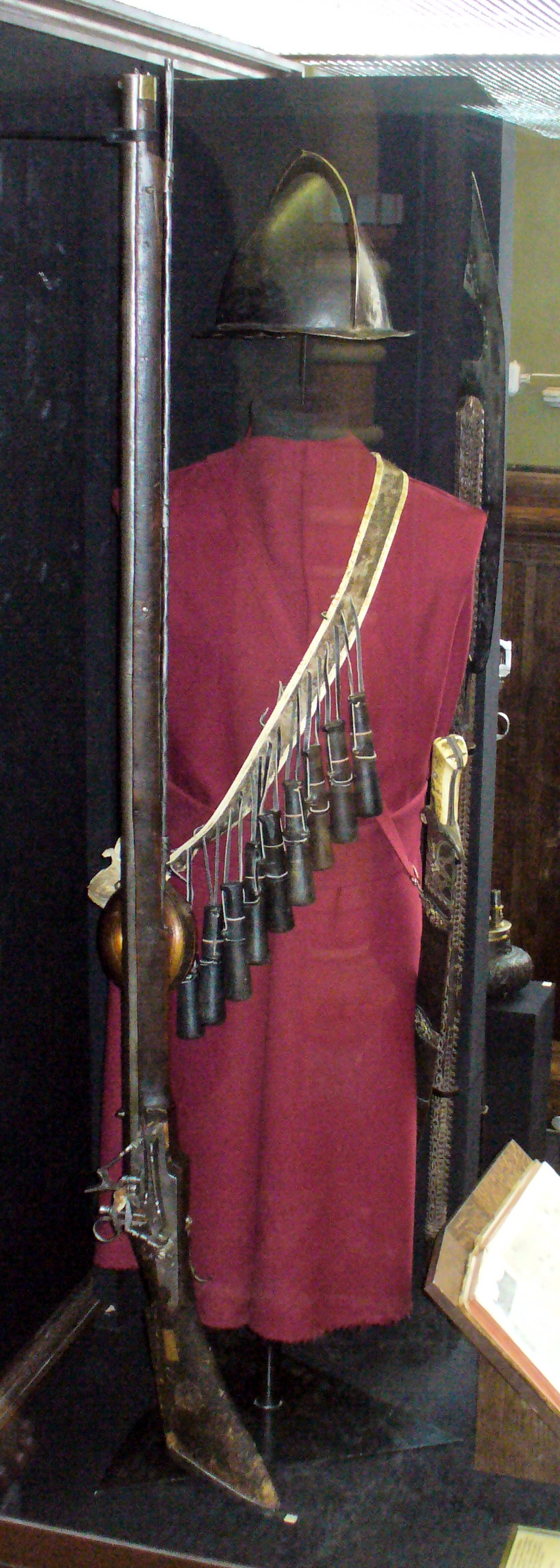 Комплекс вооружения стрельца XVII века: шлем, берендейка, сабля в ножнах, пороховница, пищаль с кремнёвым замком, бердыш.